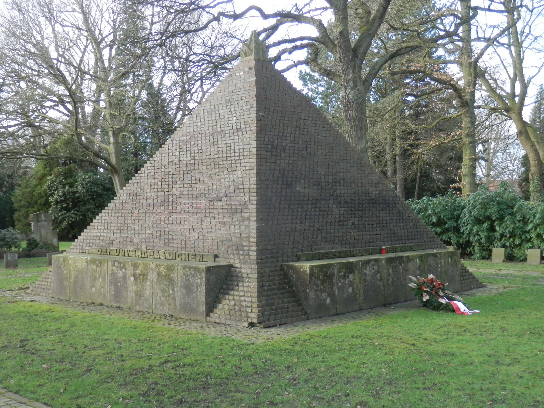 Pyramide auf dem Bremerhavener Friedhof in Wulsdorf